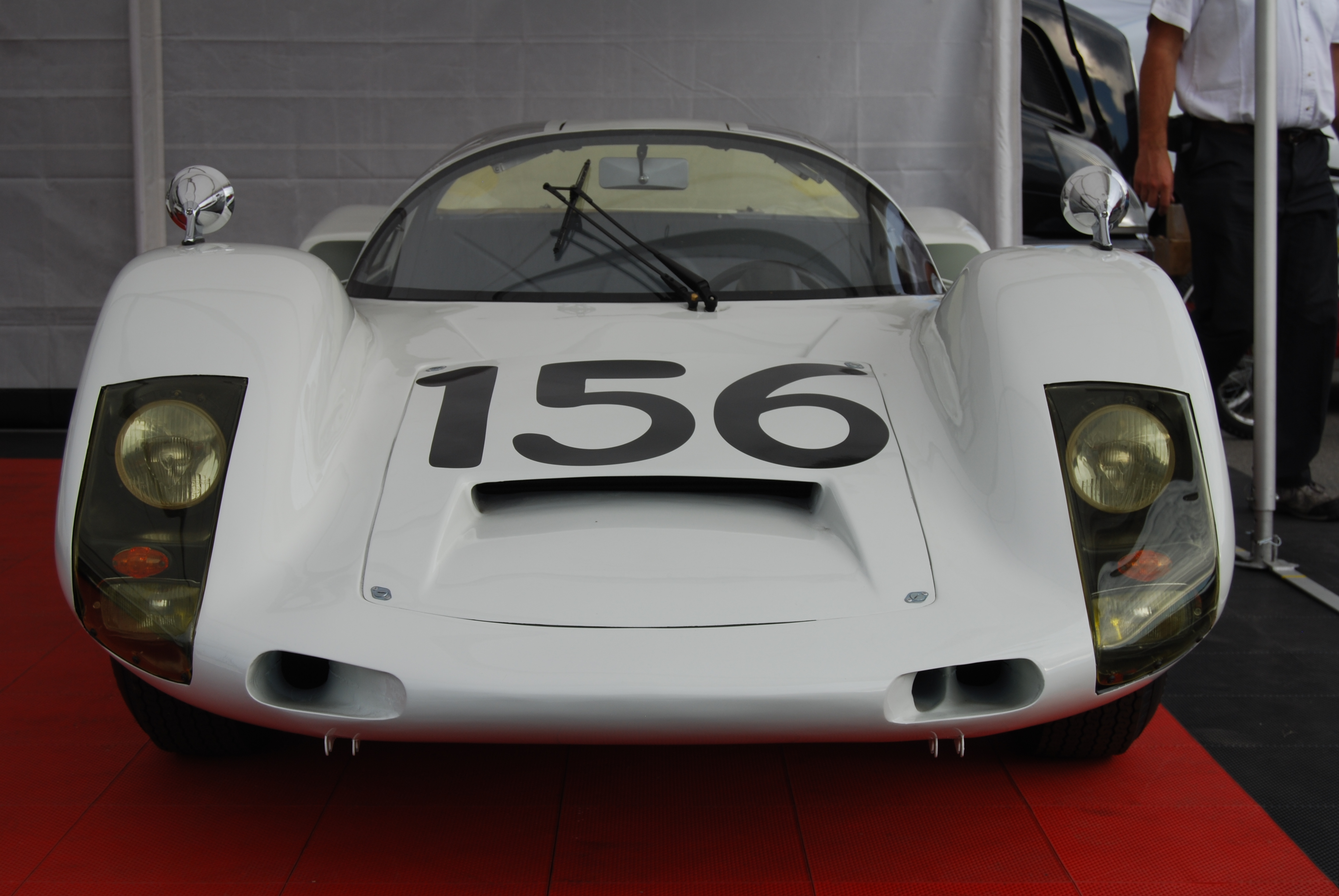 06H6_DSC_0466